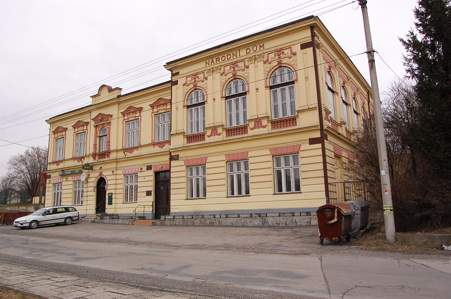 Doubrava (Karviná) Národní dům opravený v roce 1993.